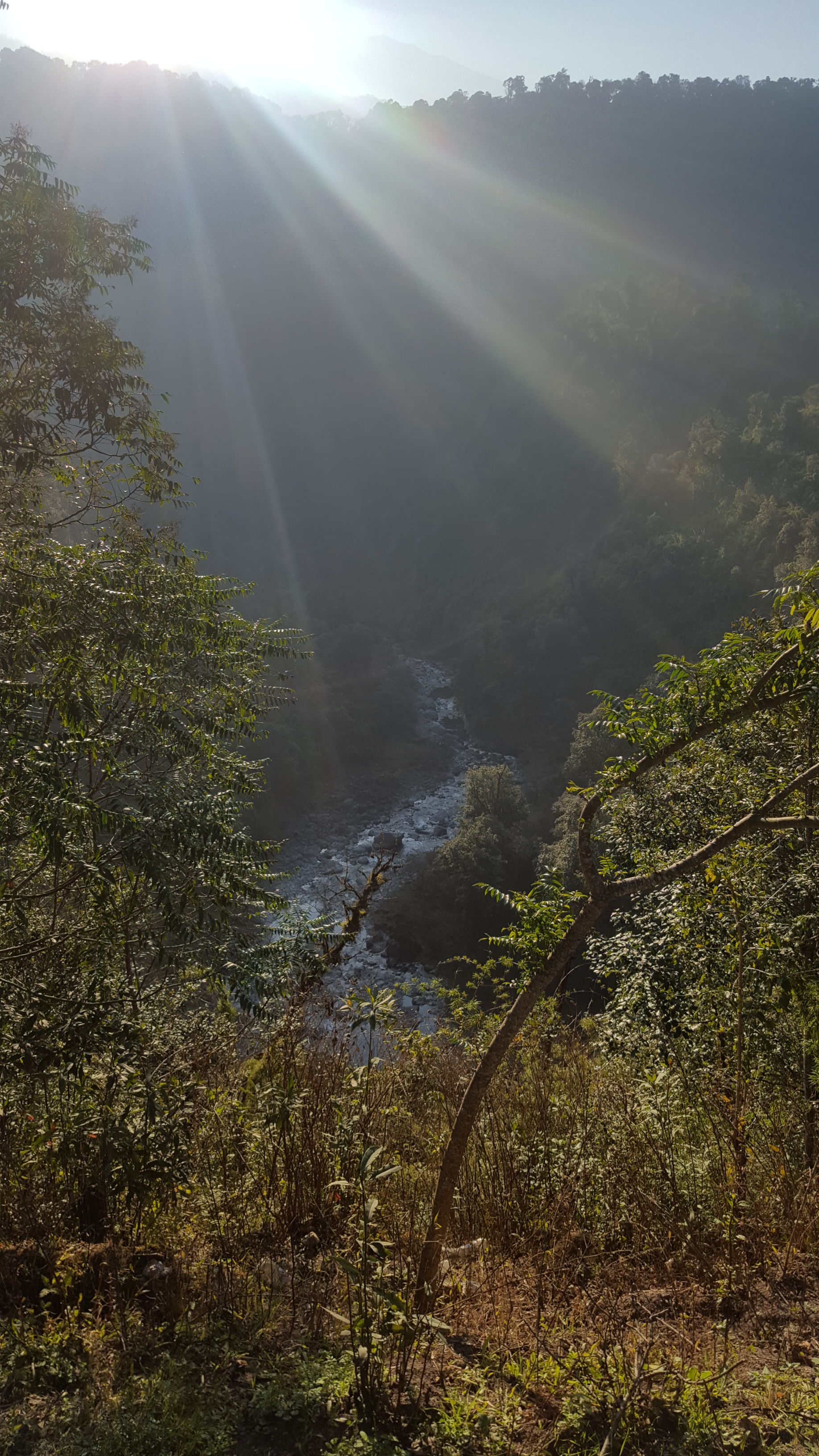 Río los Sosa visto desde mayor altura.